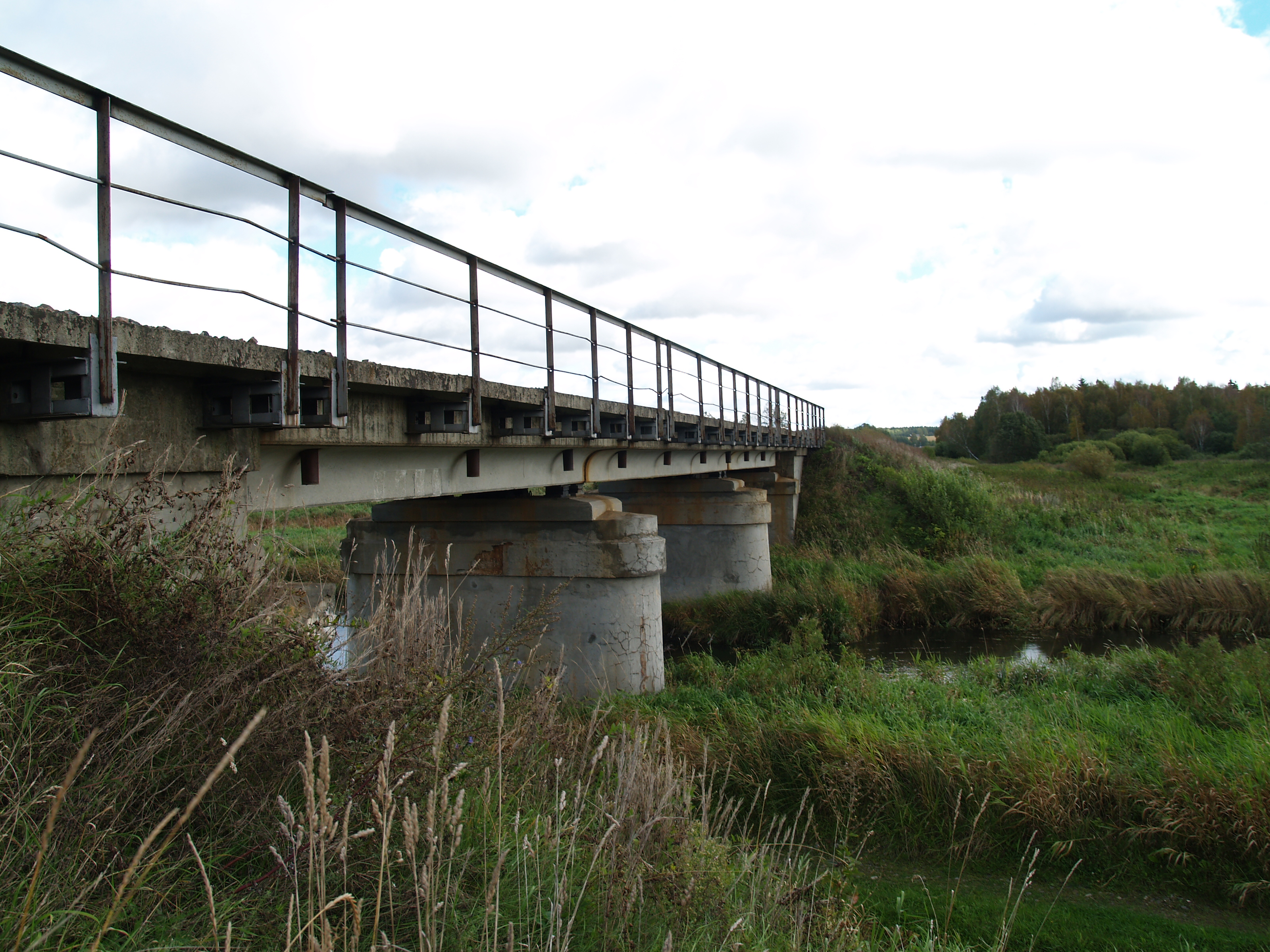 Uhti raudteesild üle Porijõe Tartu–Koidula raudteeliinil.